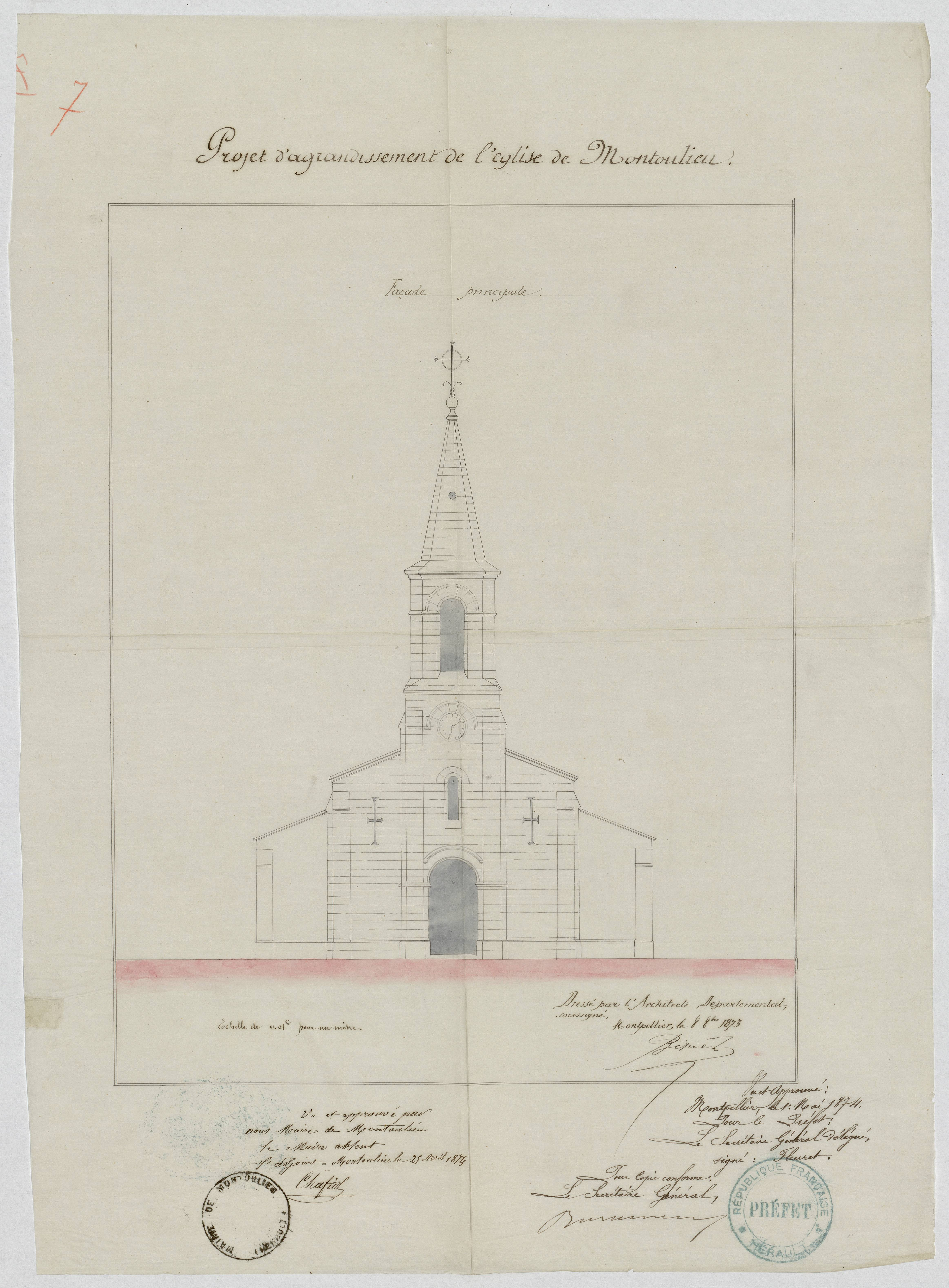 Montoulieu. - Projet d'agrandissement de l'église : plan.